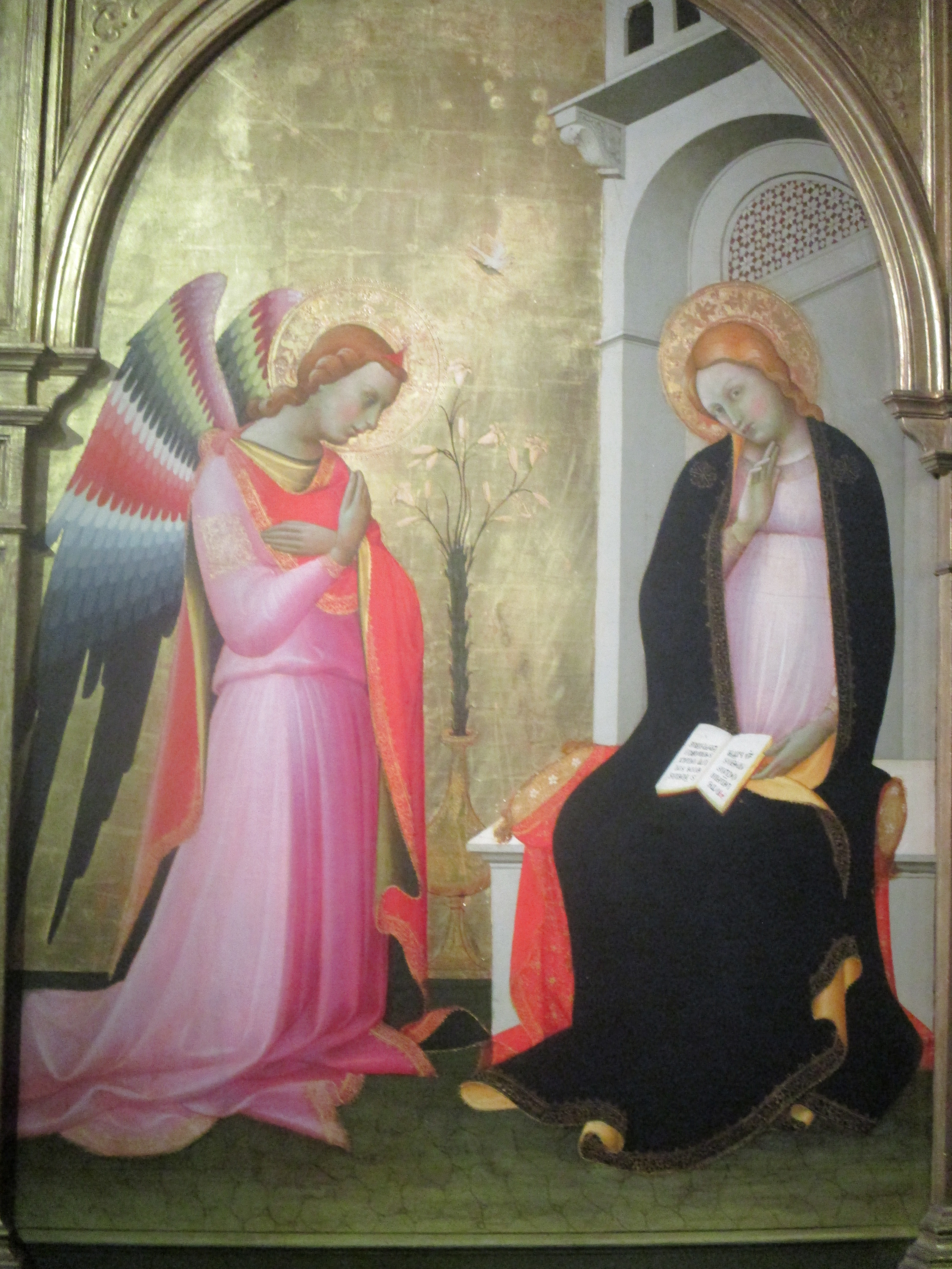 Annonciation par Lorenzo Monaco (1423-1424), tempera et or sur bois, collection Alana (Newark, États-Unis), présentée à l'exposition La Collection Alana au musée Jacquemart-André de Paris du 13 septembre 2019 au 20 janvier 2020.